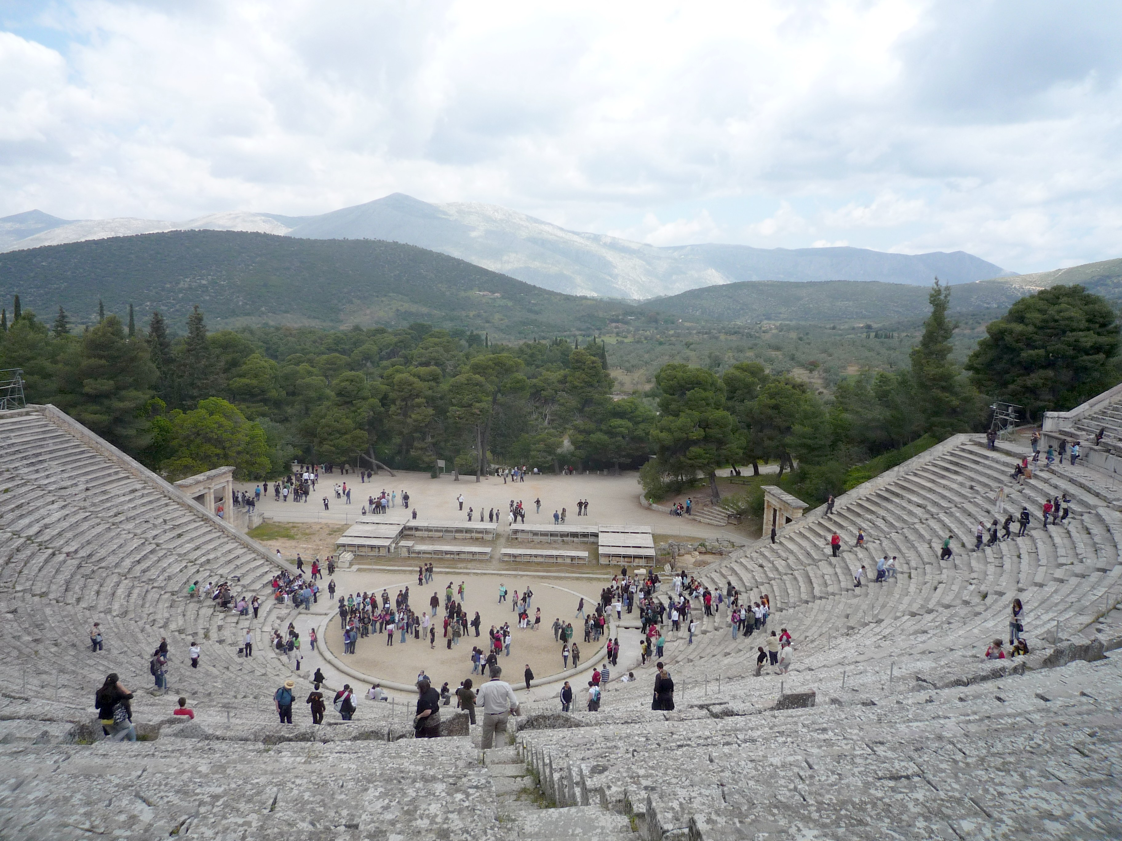 Vue du théâtre d'Epidaure en Grèce avec les montagnes qui l'entourent